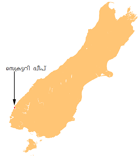 സെക്രട്ടറി ദ്വീപിൻറ്റെ സ്ഥാനം